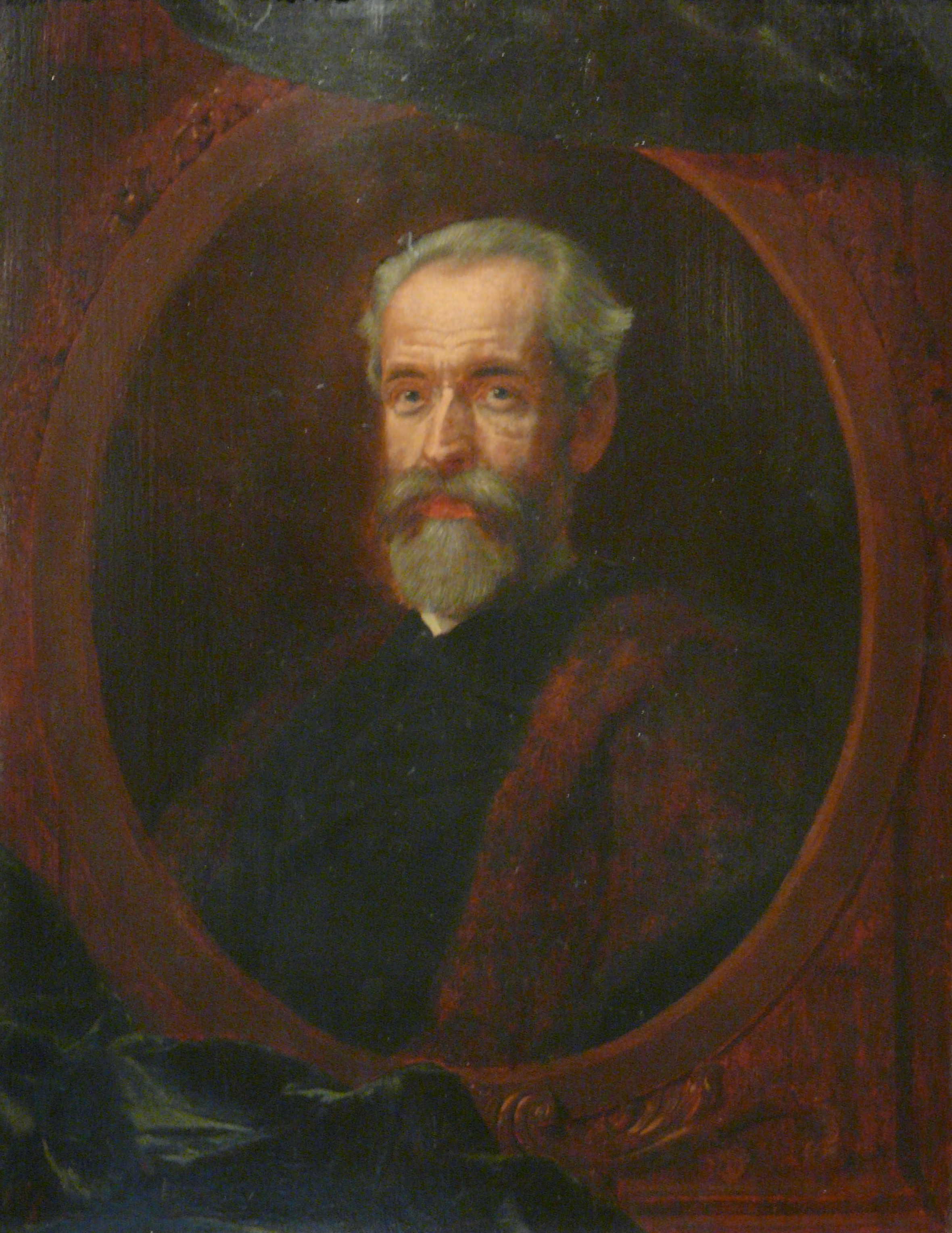 Portret Władysława Czartoryskiego. Polska 2-ga połowa XIX w., olej na desce.